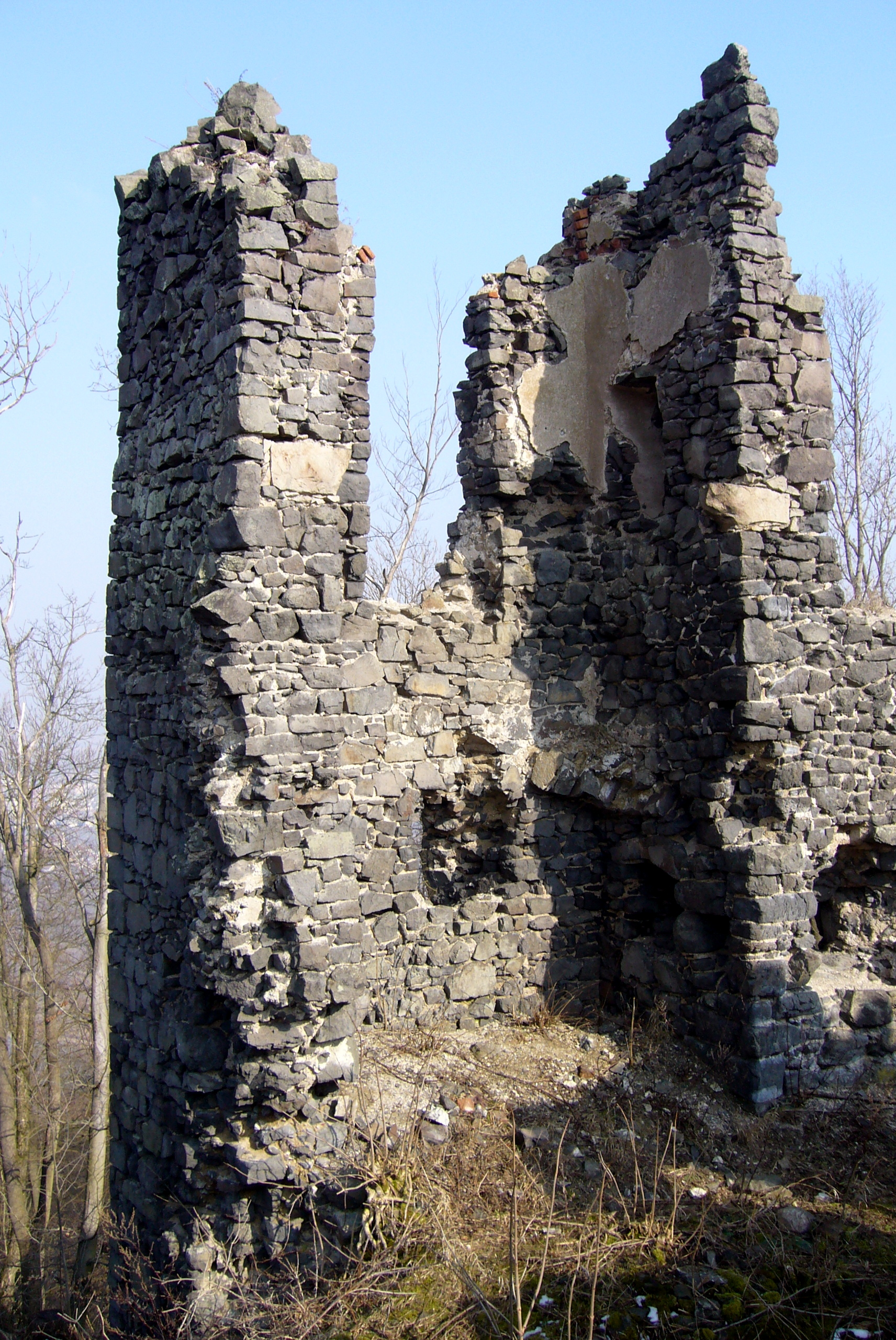 Hrad Šumburk - interiér severovýchodní bašty